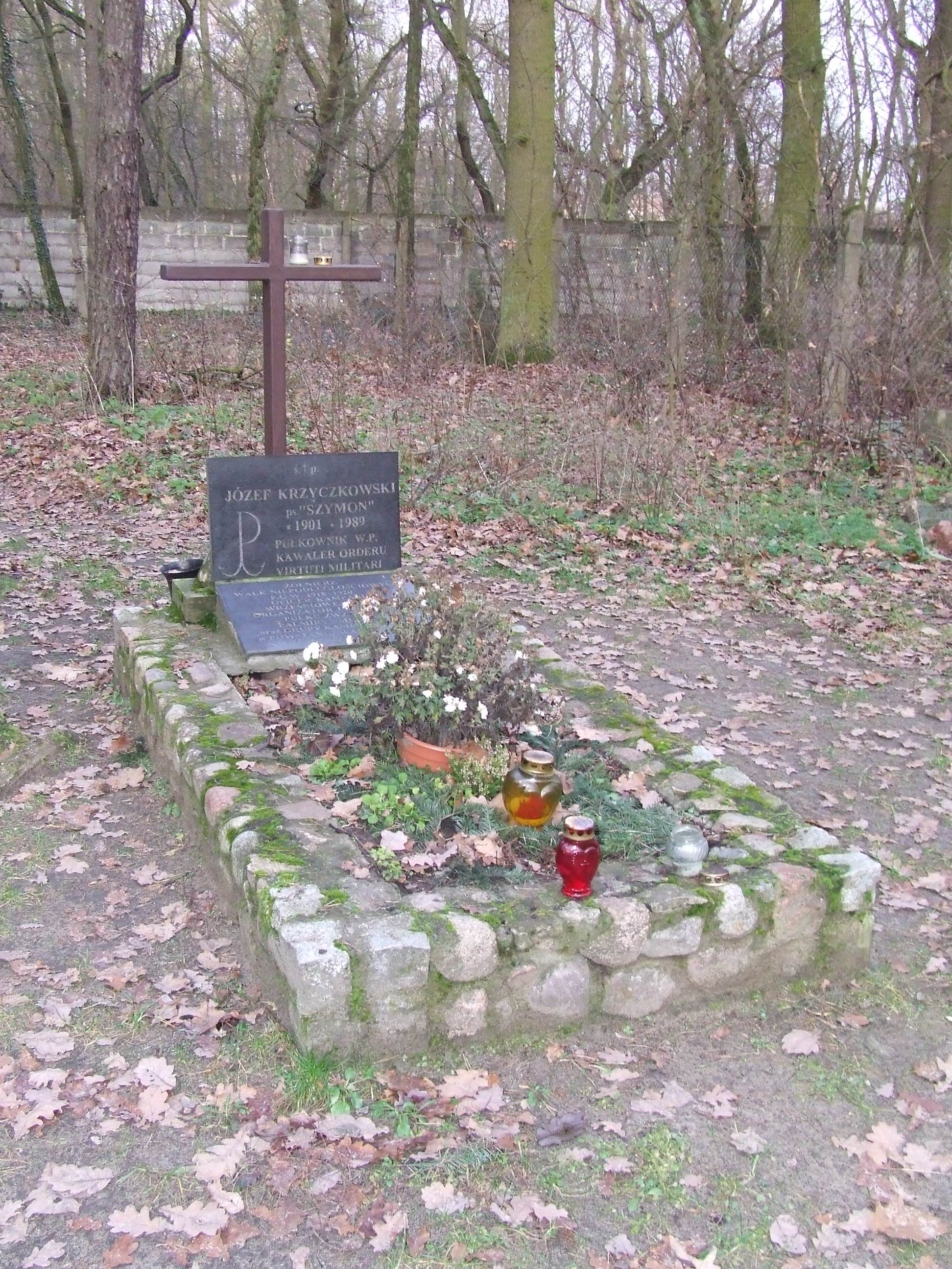 Grób Krzyczkowskich, Cmentarz leśny, Laski